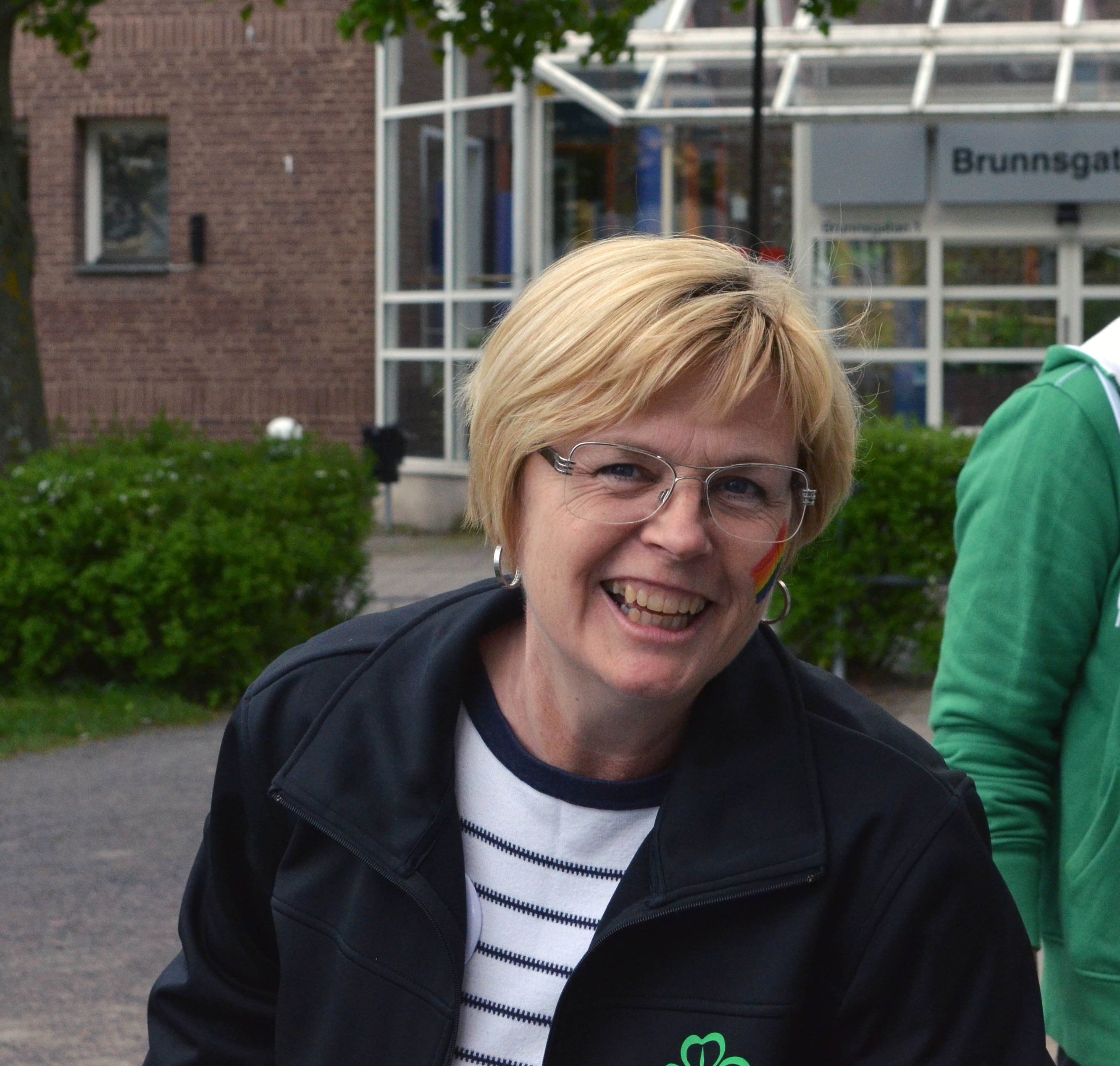 Ann-Mari Nilsson under prideparad i Jönköping, 23 maj 2015.